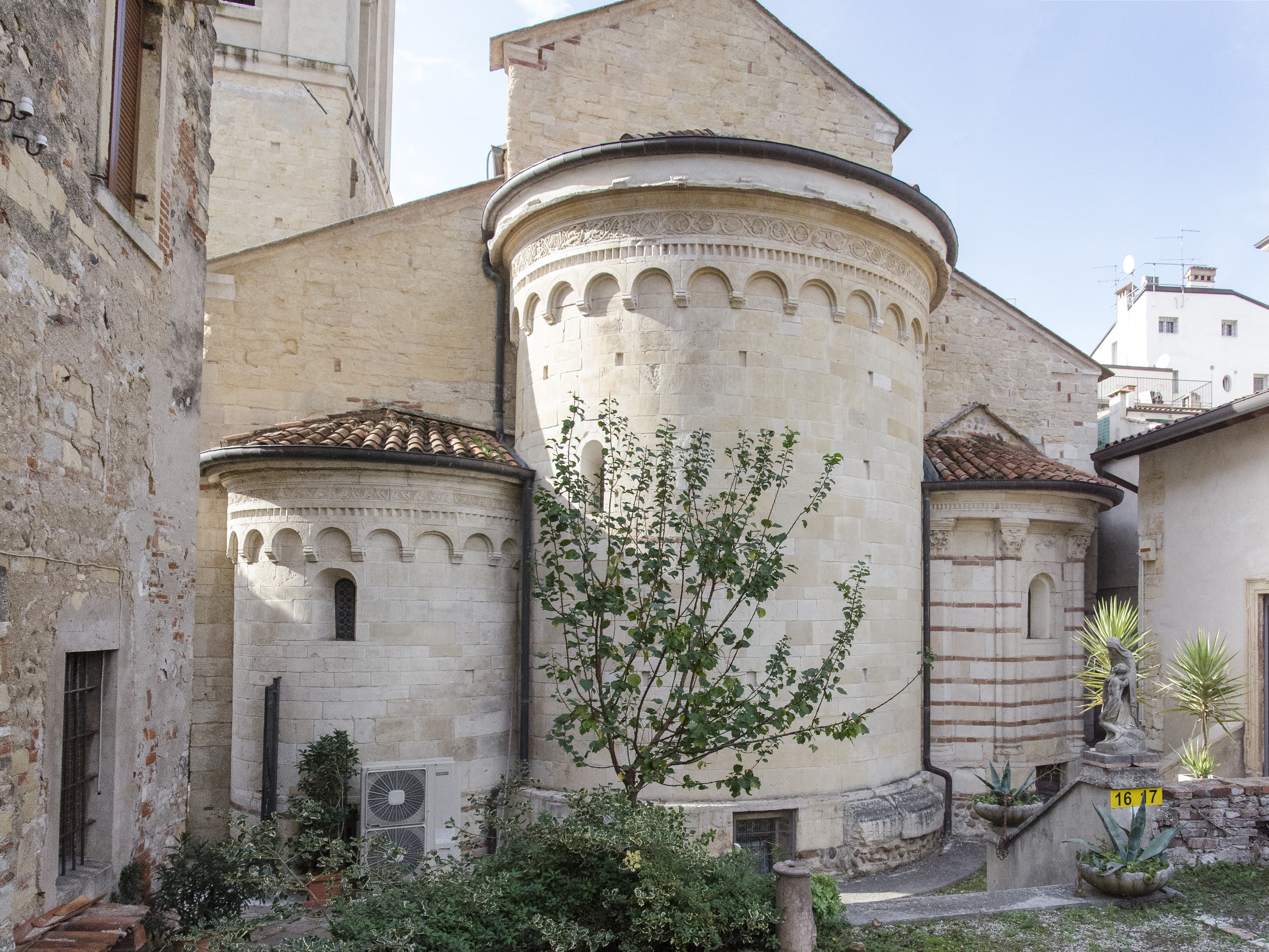 Vista d'insieme delle tre absidi